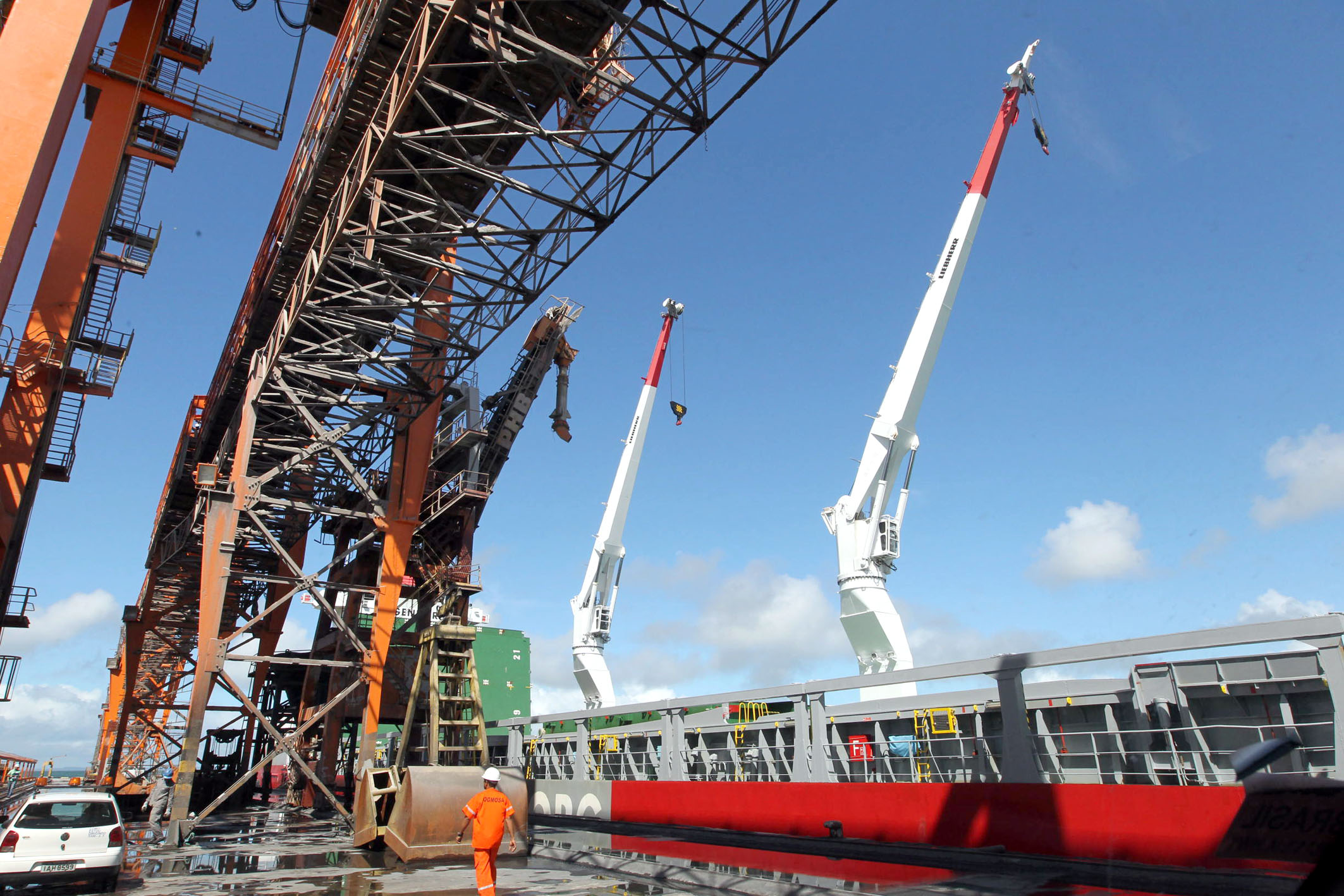 Governador Jaques Wagner visita Porto de Aratu e participa de reunião do Conselho de Administração da Codeba.. Na foto: Equipamentos recuperados do Porto de Aratu Foto: Manu Dias/AGECOM